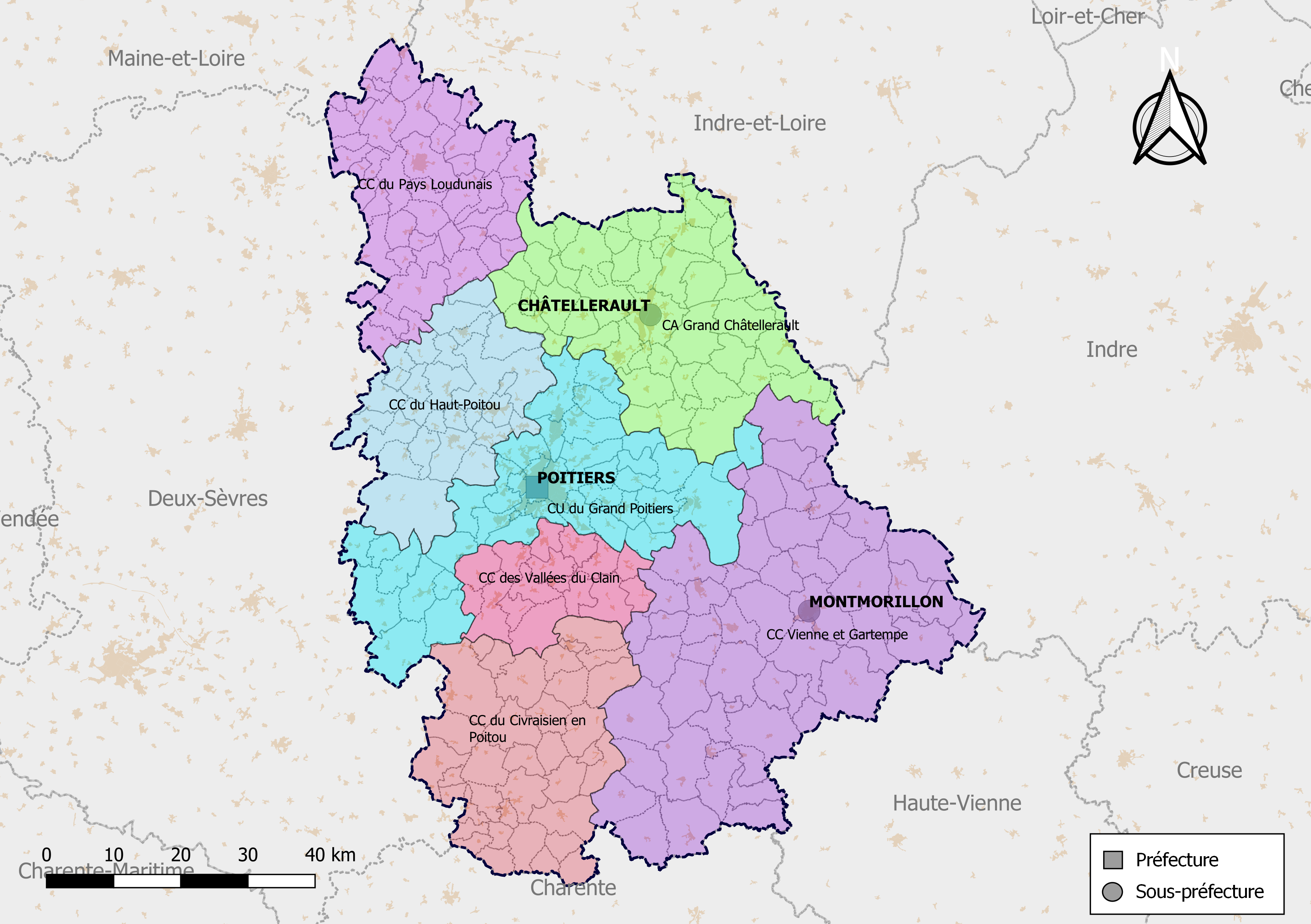 Carte des intercommunalités du département de la Vienne, France. Composition au 1er janvier 2019.